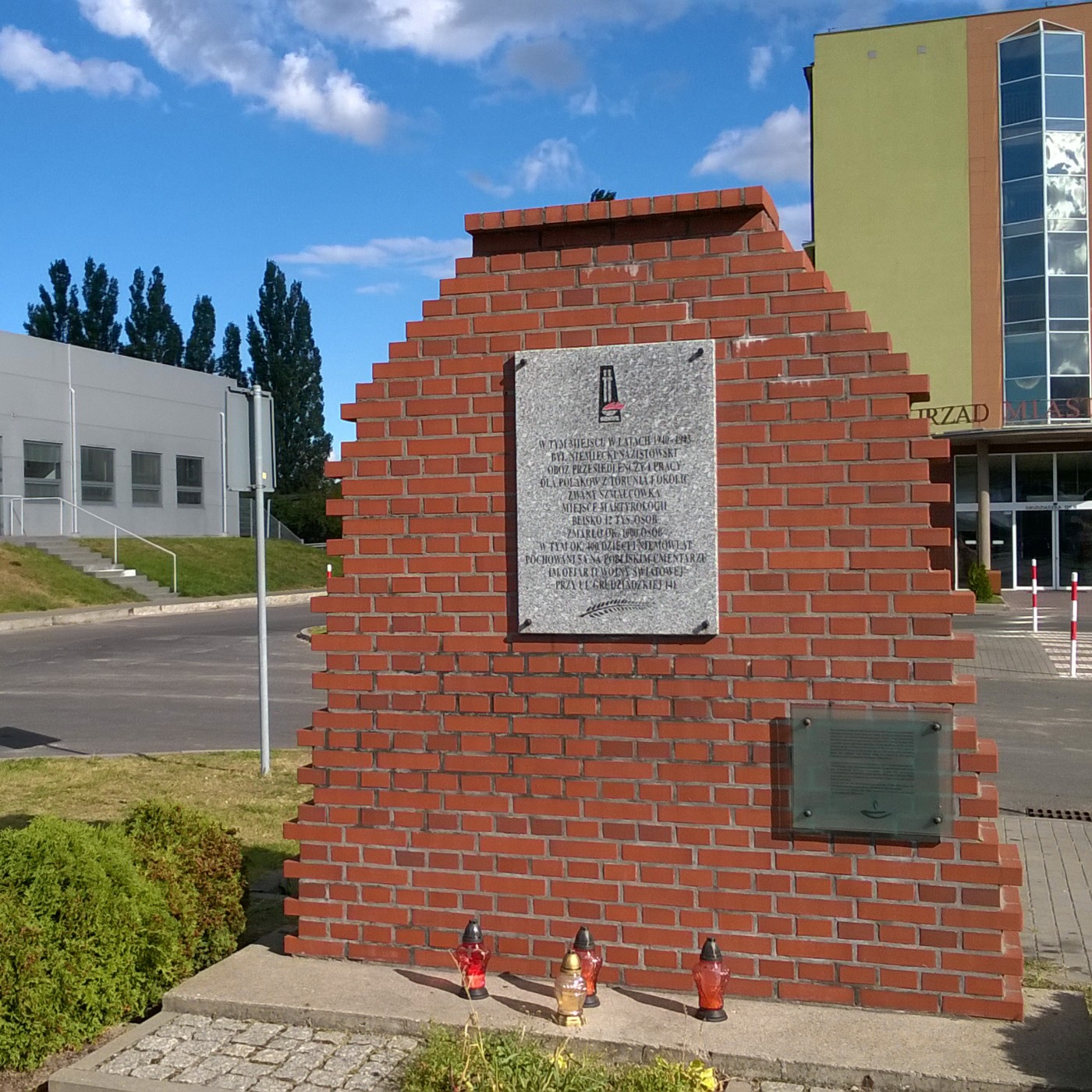 Pomnik w formie fragmentu ceglanego muru z tablicą upamiętniającą ofiary Szmalcówki w Toruniu